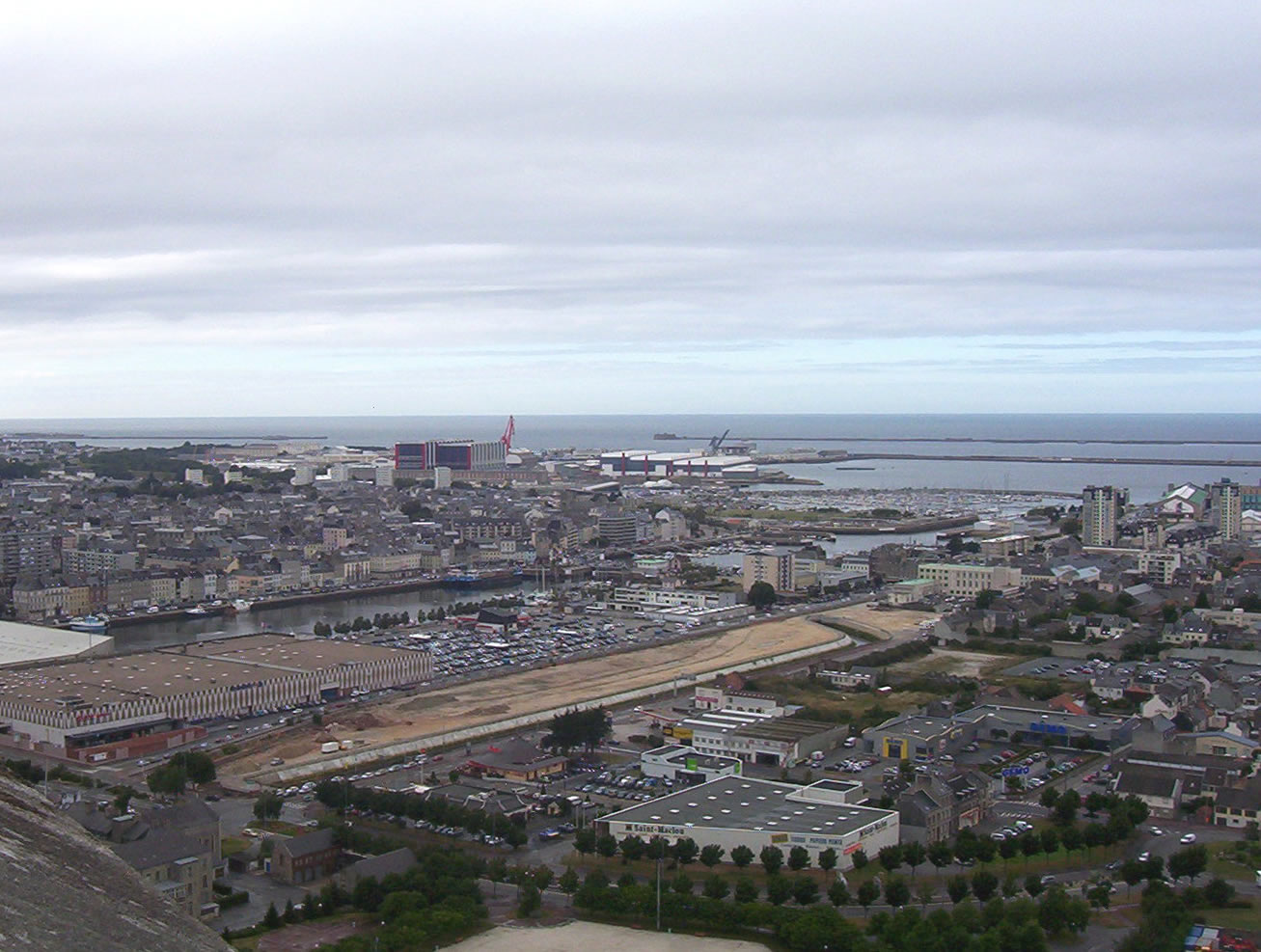 Vue générale de Cherbourg, depuis le fort du Roule. 1er pla : zone commerciale des Bassins, canal de retenue comblé. A gauche : bassin de commerce, quai Alexandre-III et avant-port civil. Arrière plan, de gauche à droite : hangars de l'arsenal, port de plaisance, gare transatlantique, tours du casino.